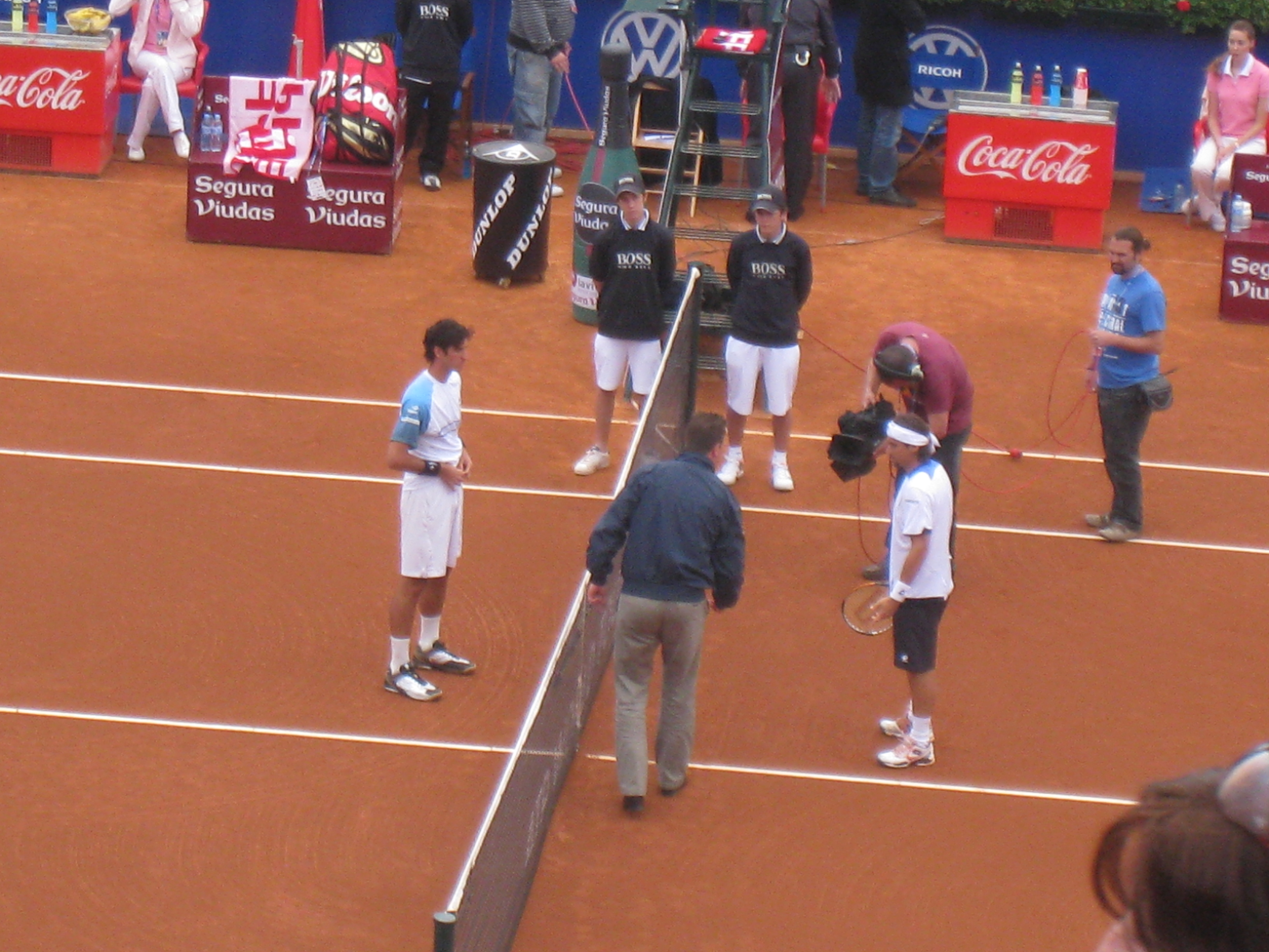 2010 Barcelona Open - Thomaz Bellucci & David Ferrer